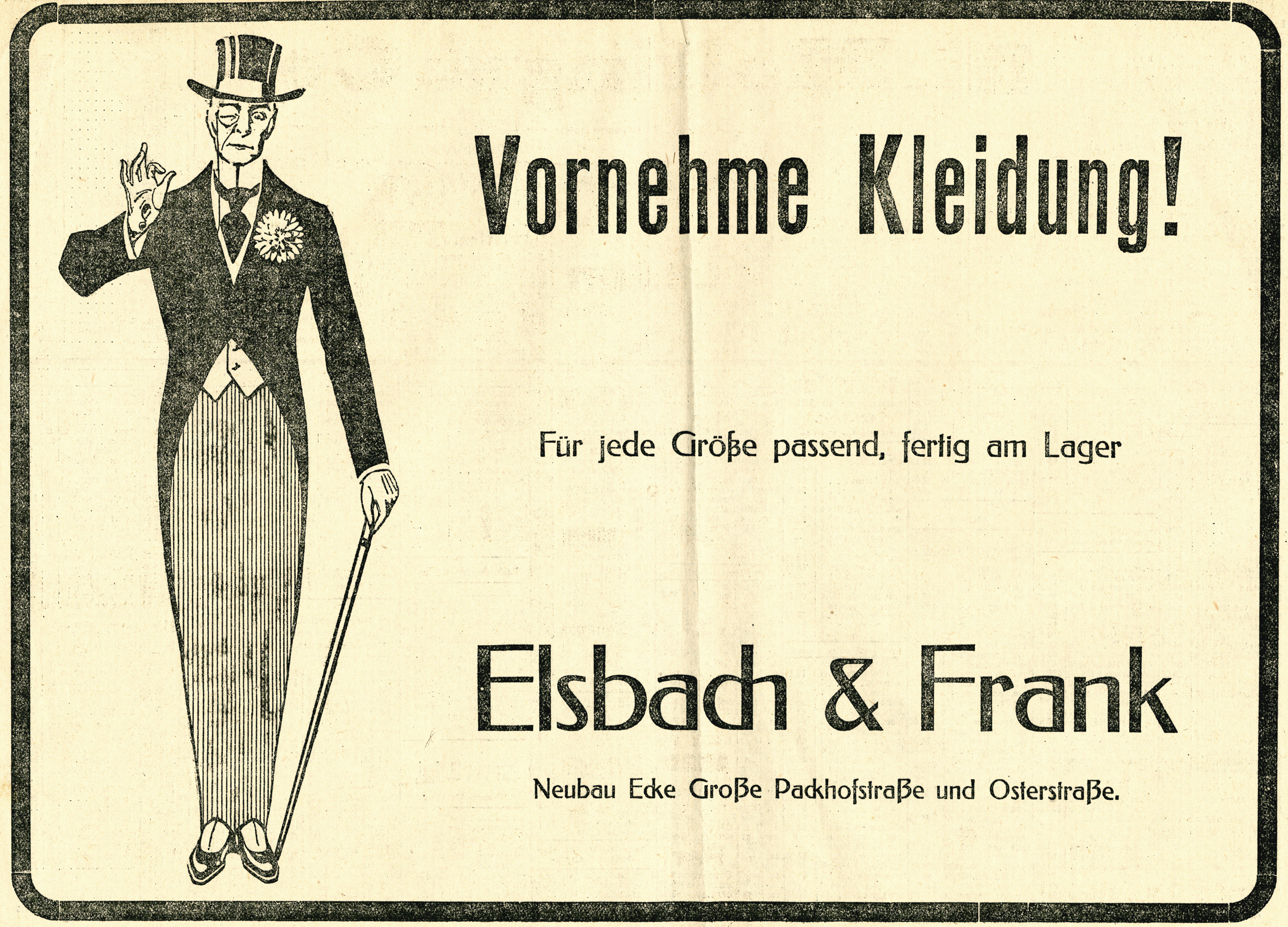 Halbseitige Werbeanzeige im Hannoverschen Anzeiger, 2. Beilage zu Nr. 137 von Sonnabend, den 14. Juni 1913. Zu sehen ist ein vornehmer Herr mit Zylinder, Monokel, Gehstock und Handschuhen, Frack und Flanellhose sowie Schuhen mit Gamaschen, daneben der Text „Vornehme Kleidung! / Für jede Größe passend, fertig am Lager / Elsbach & Frank / Neubau Ecke Große Packhofstraße und Osterstraße.“ ...